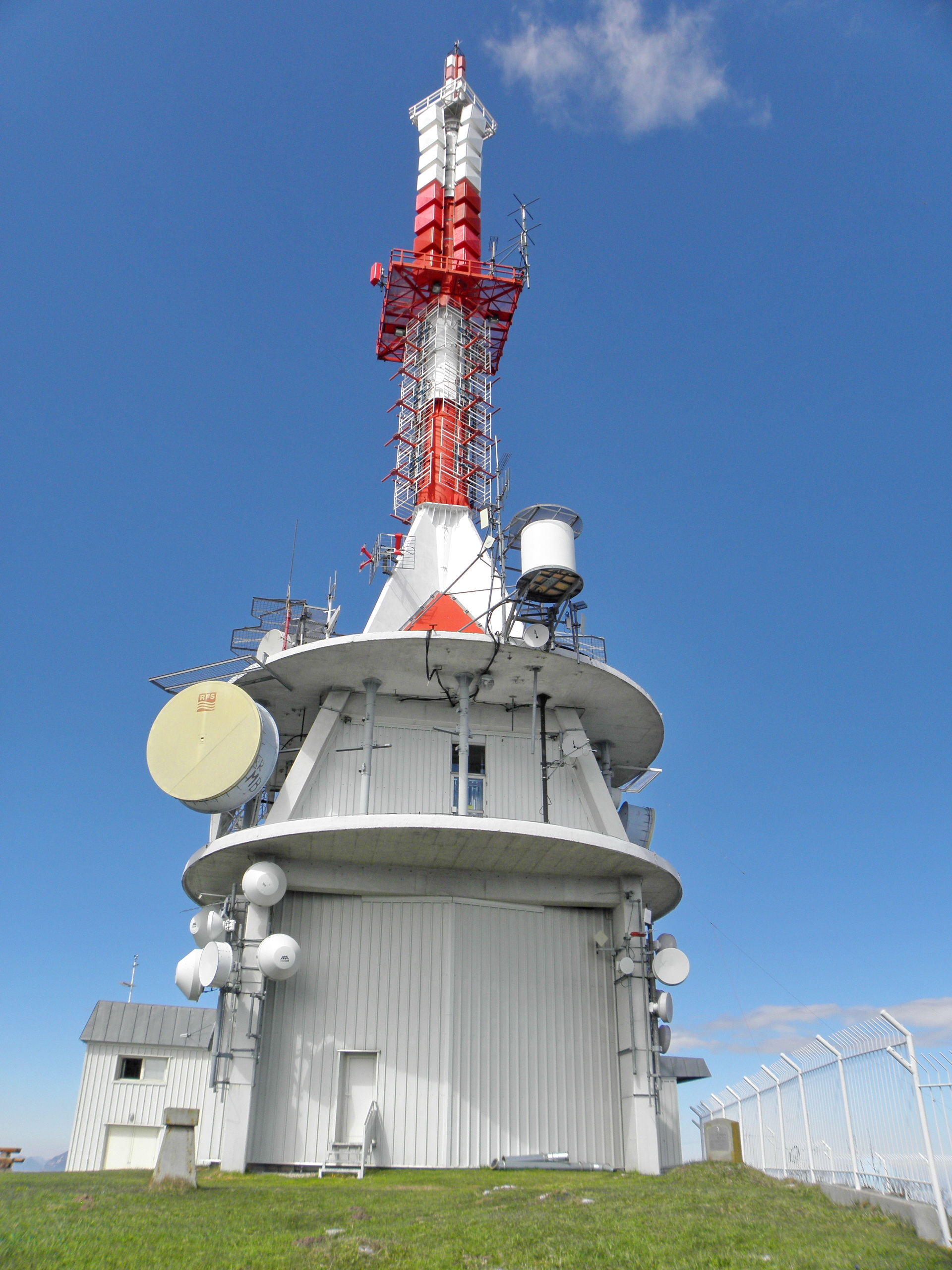 Oddajnik Plešivec-Uršlja gora